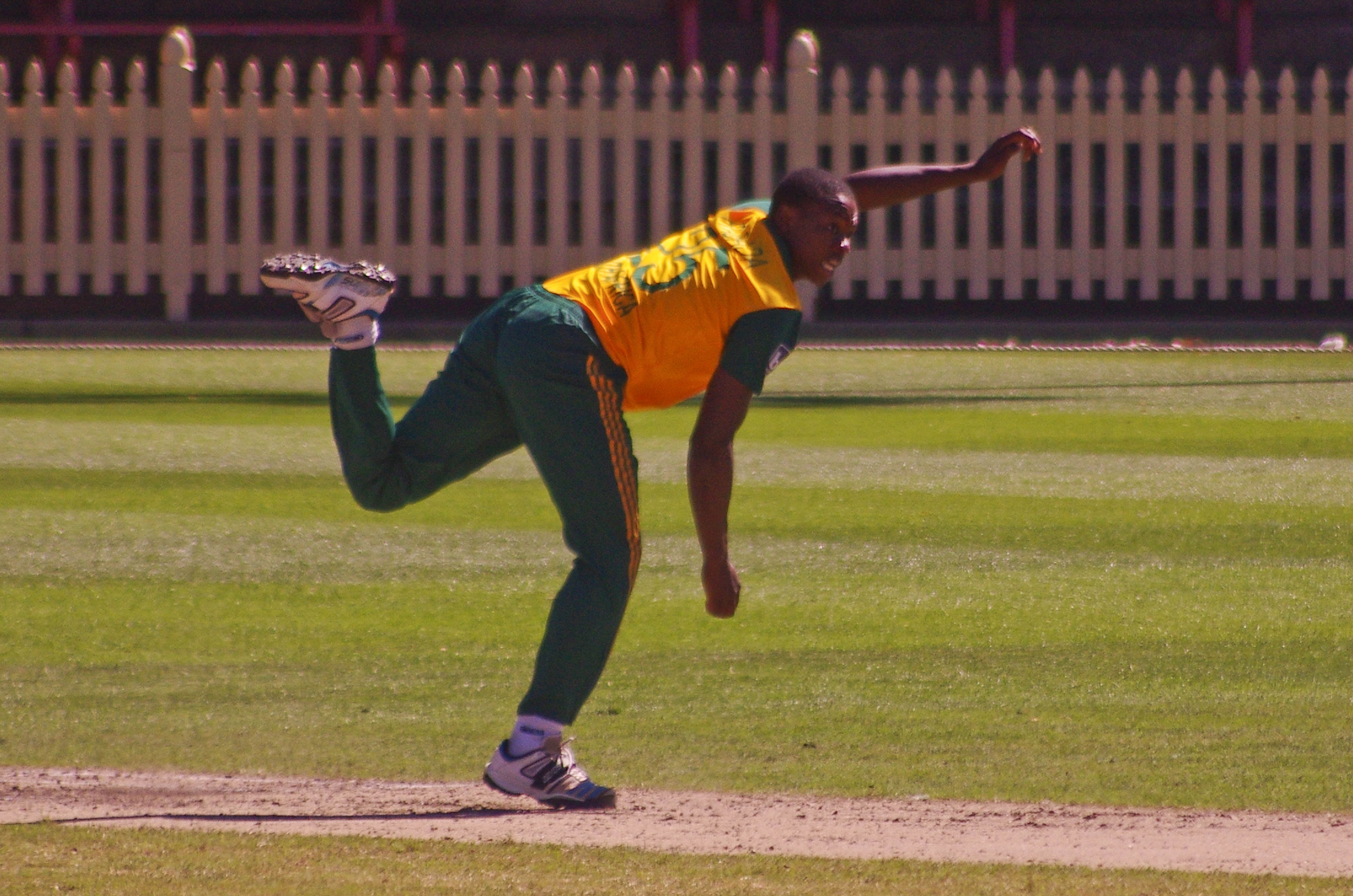 KAGISO RABADA